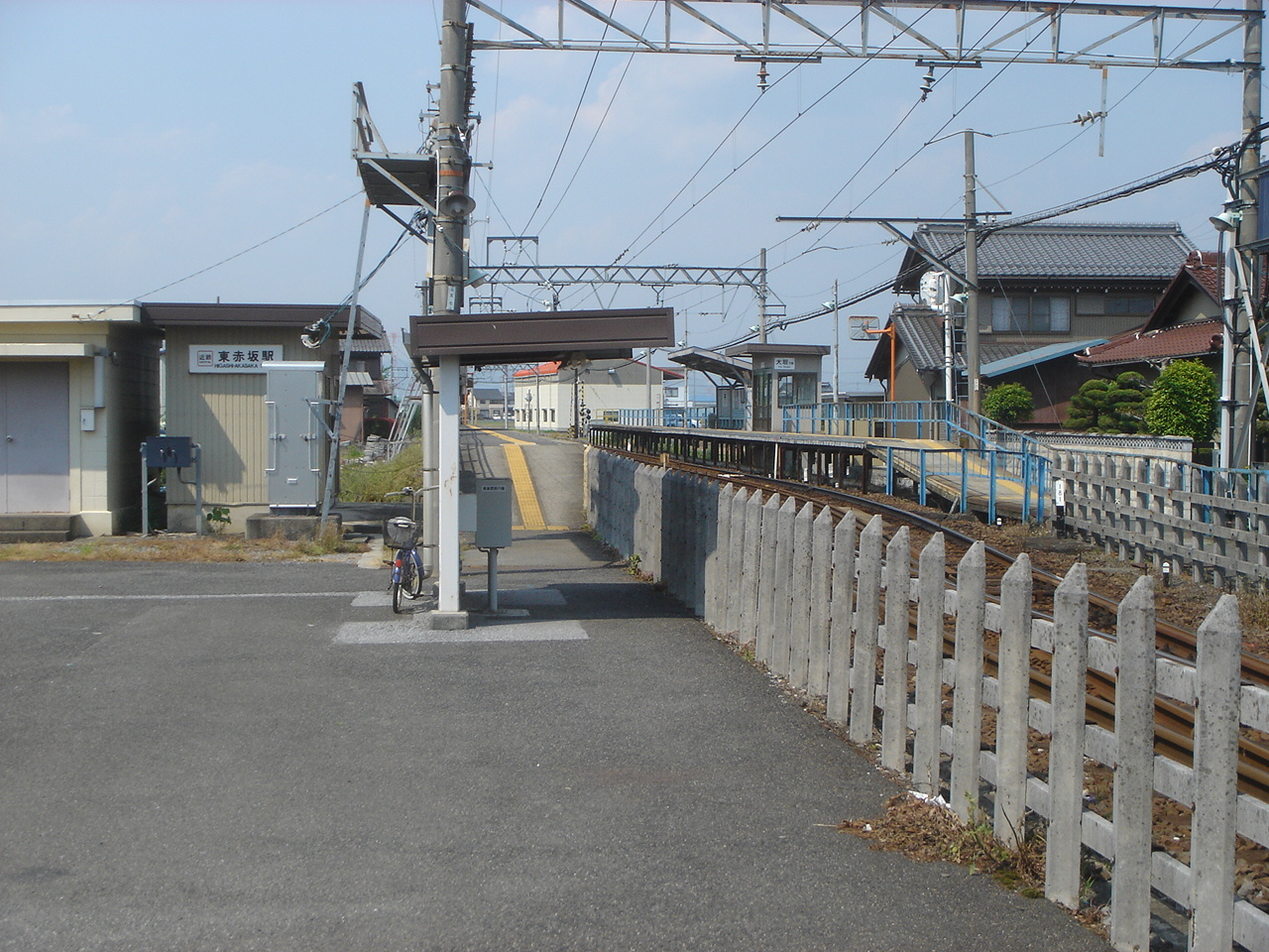 Higashi-Akasaka-Eki01(東赤坂駅),Godo,Gifu,Japan(岐阜県神戸町)で撮影